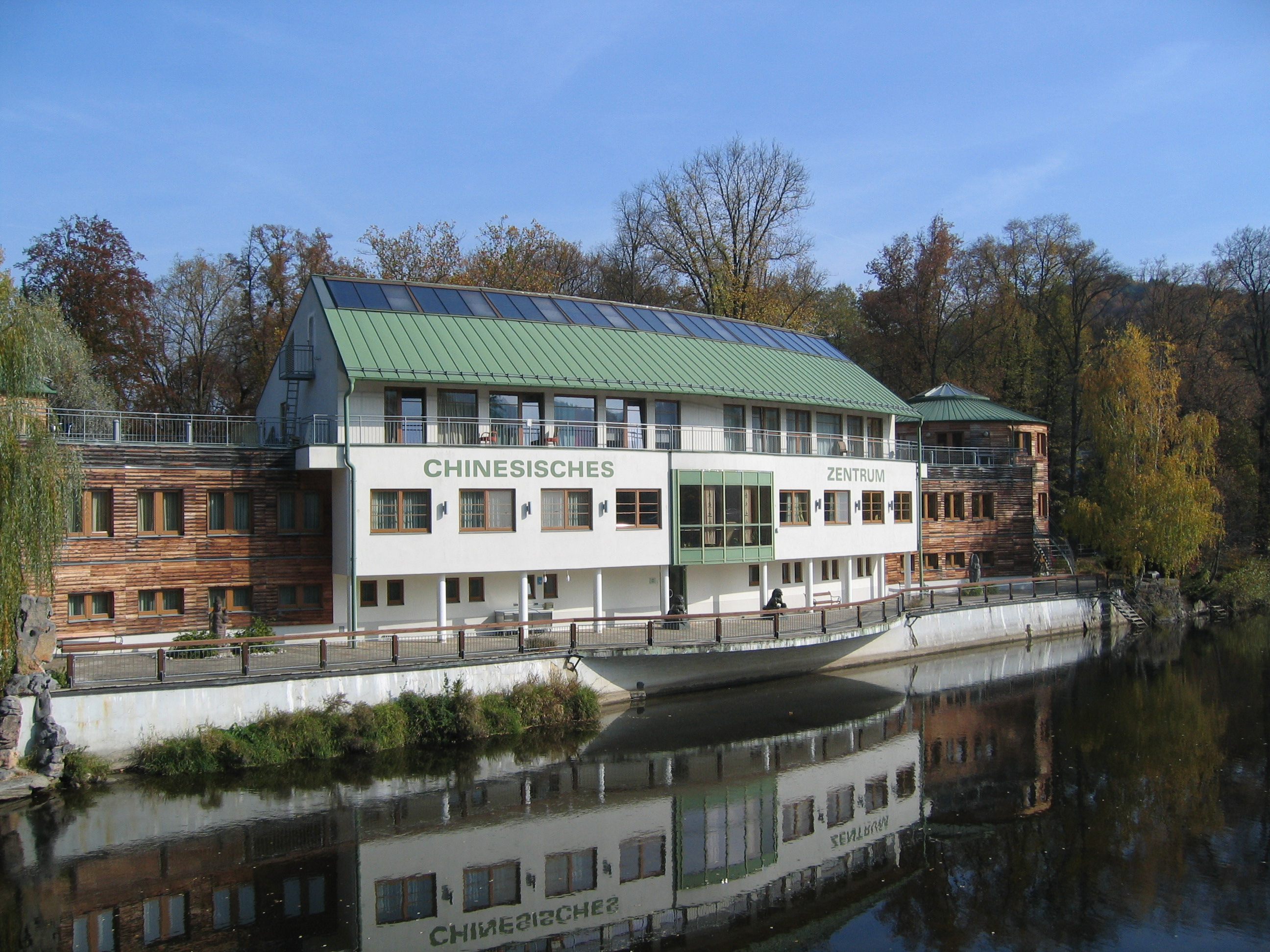 Das mittlerweile ungenützte Chinesisches Zentrum in Gars am Kamp